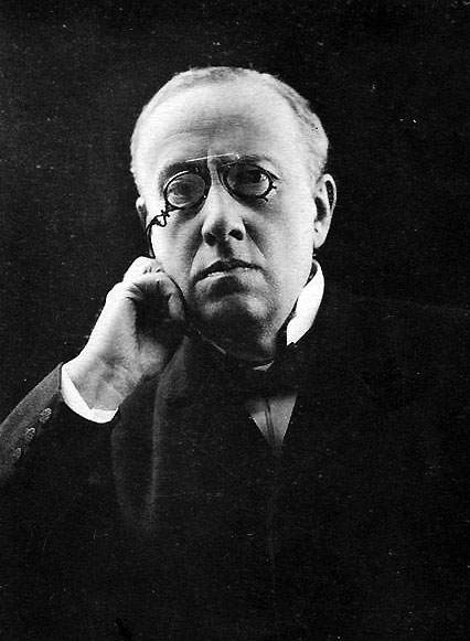 Emil Hillberg